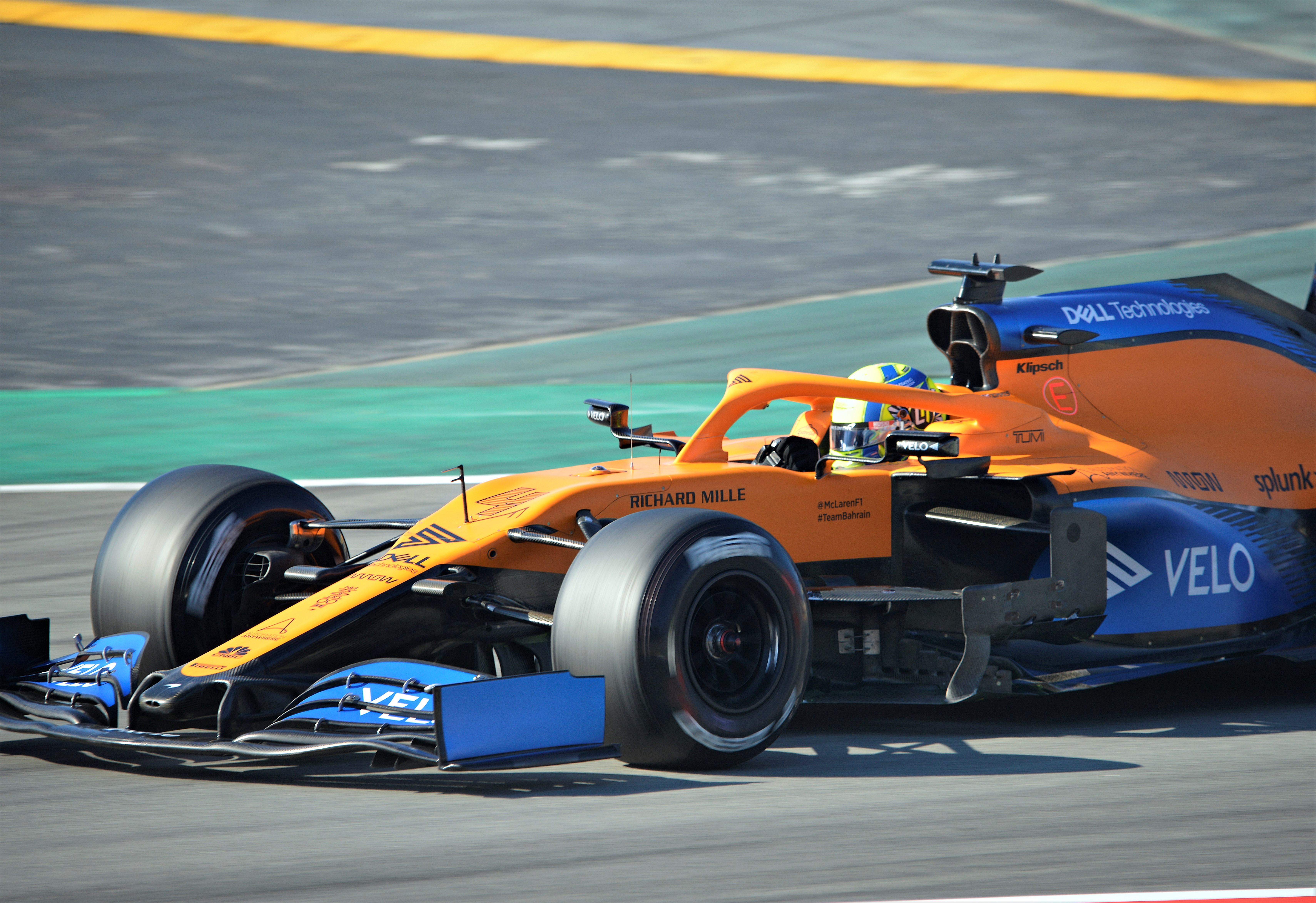 Test Days F1 2020